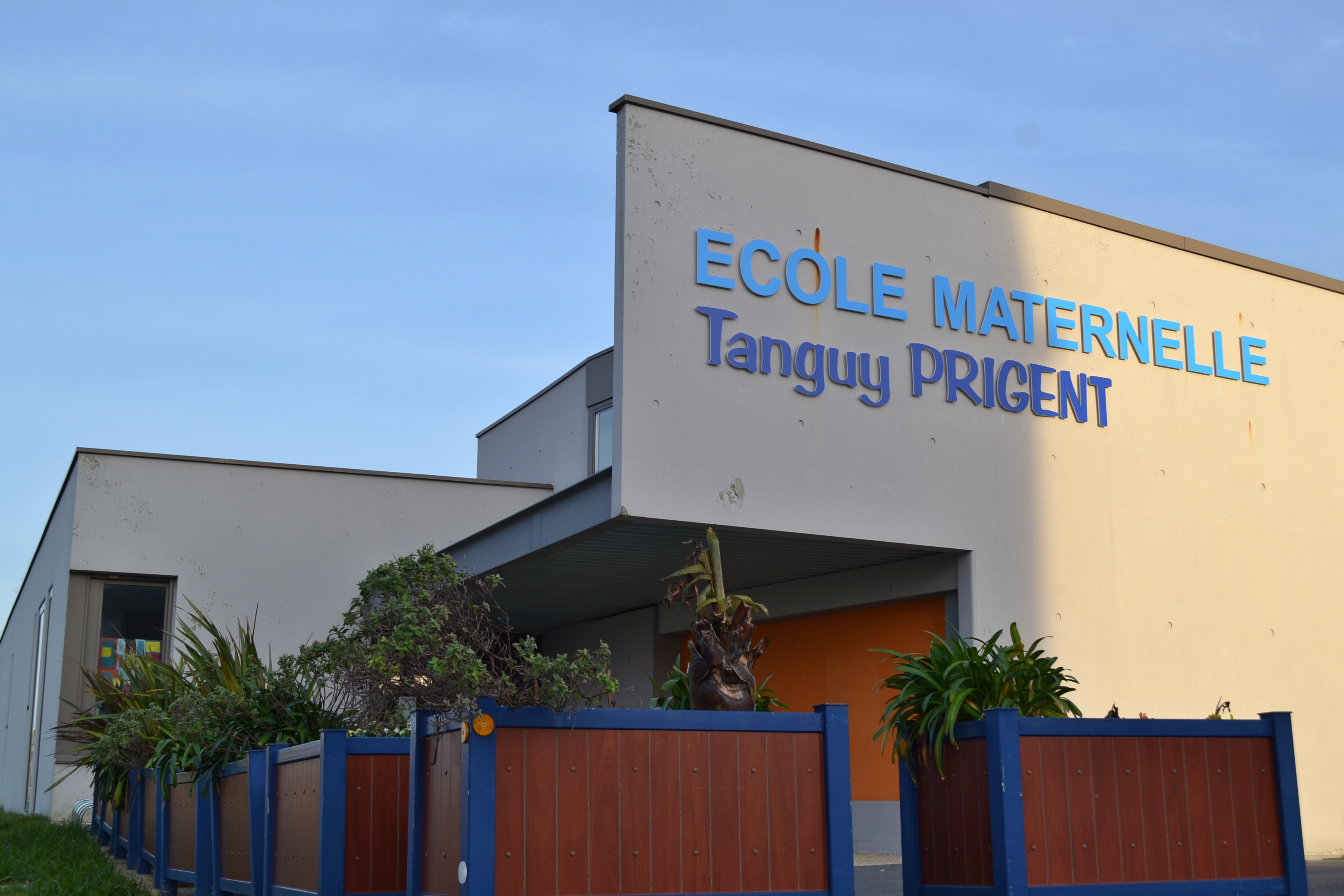 Ecole Tanguy Prigent à Santec.